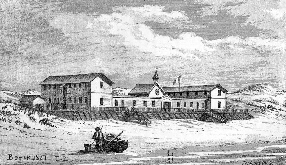 L'hôpital provisoire de Berck après la construction de la galerie face à la mer construite après la mise en service de l'établissement, début juillet 1861, du fait de l'ensablement de la cour et de l'affouillement des fondations par le vent.